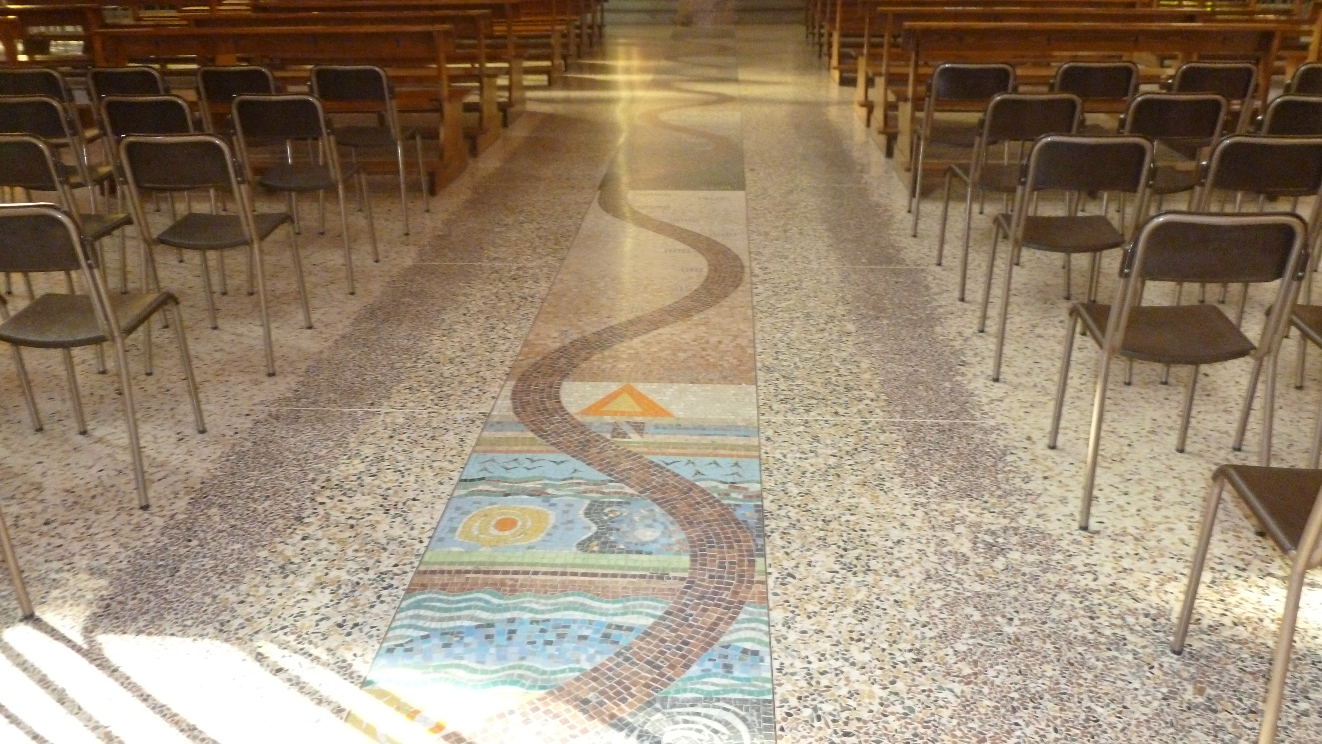 Particolare del pavimento della chiesa di San Carlo di Brugherio